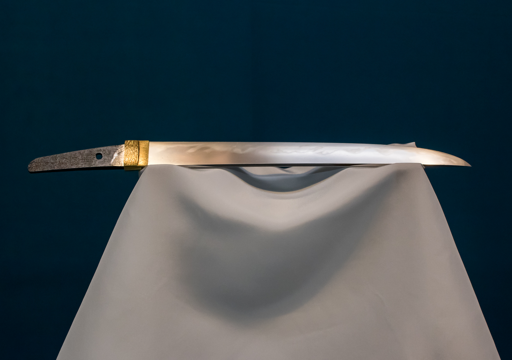 短刀 - 青江次直「銘 備中住次直作」（重要文化財）、南北朝時代（1358）。東京国立博物館。